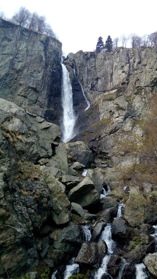 Kademliisko Pruskalo - Waterfall in Bulgaria